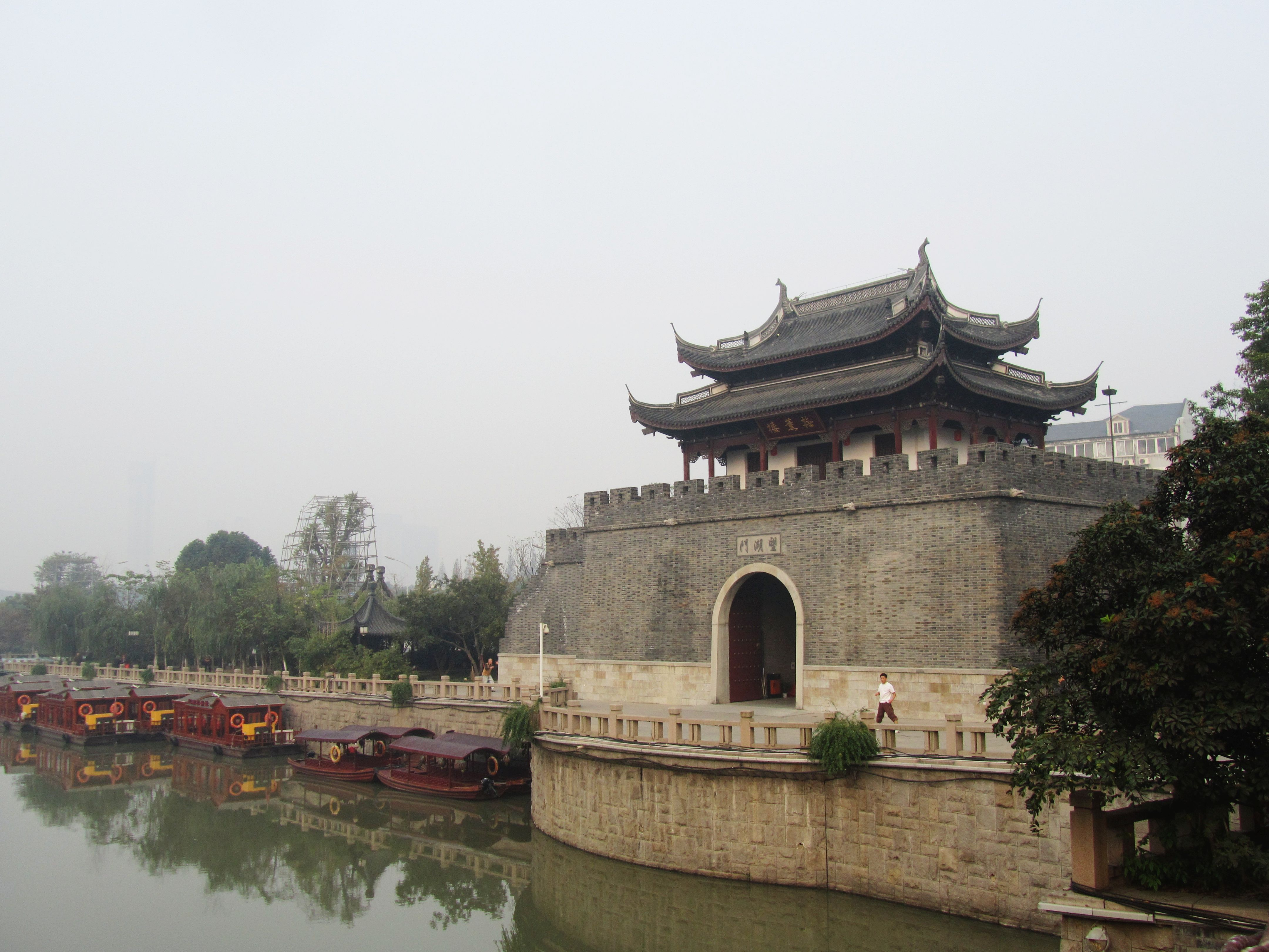 新建的无锡古城南门望湖门。